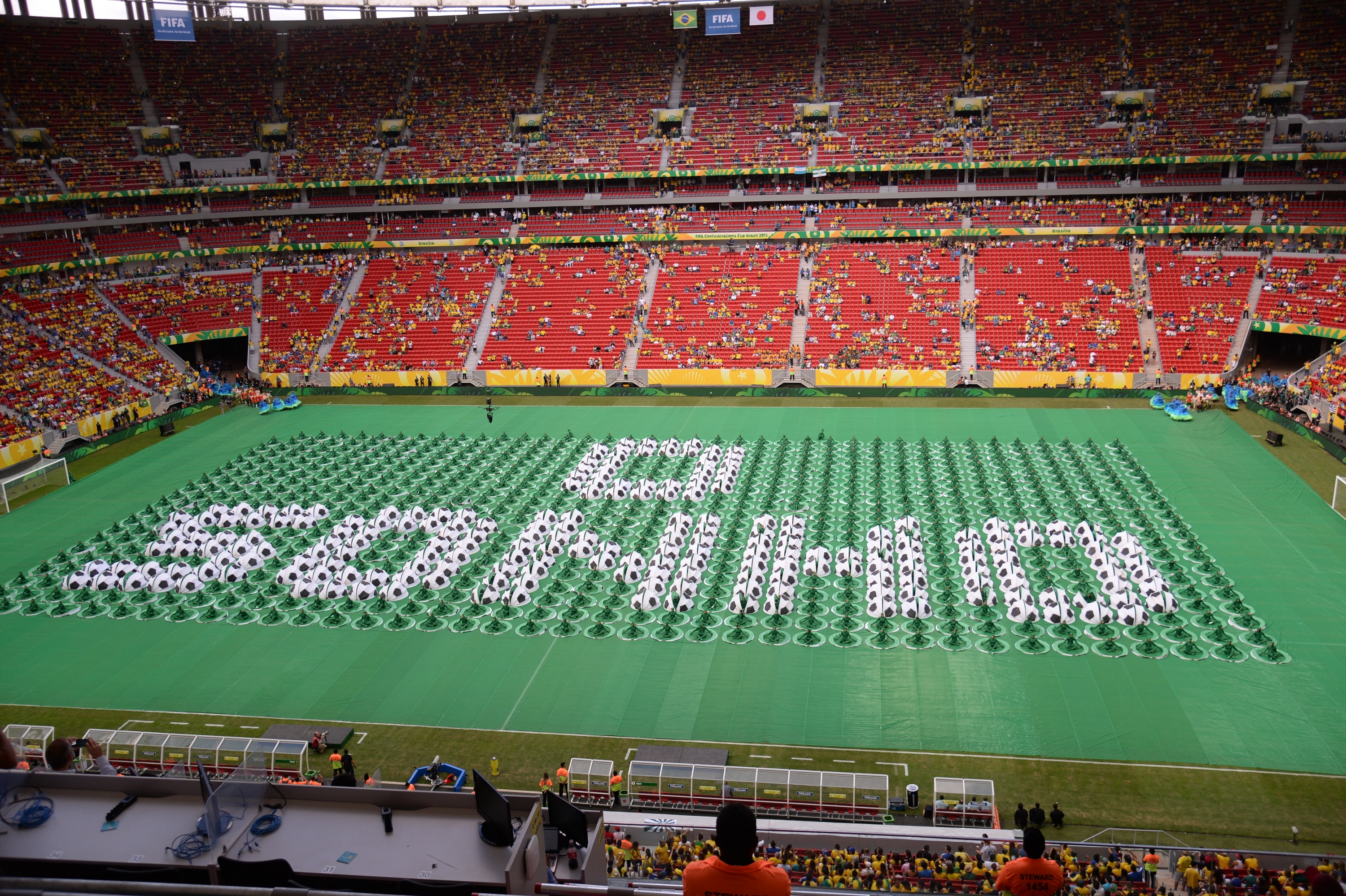 Mosaico formado no gramado do Estádio Nacional de Brasília, na cerimônia de abertura da Copa das Confederações de 2013